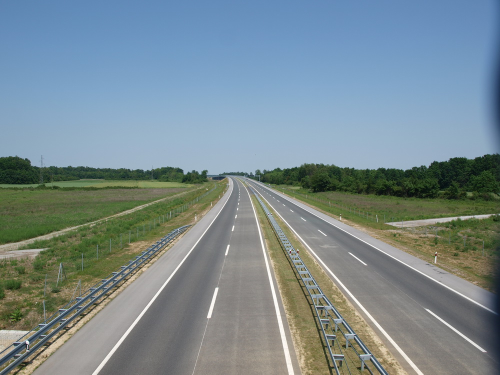 Autocesta A5 (Slavonika), kod Donjih Andrijevaca, Brodsko-posavska županija..